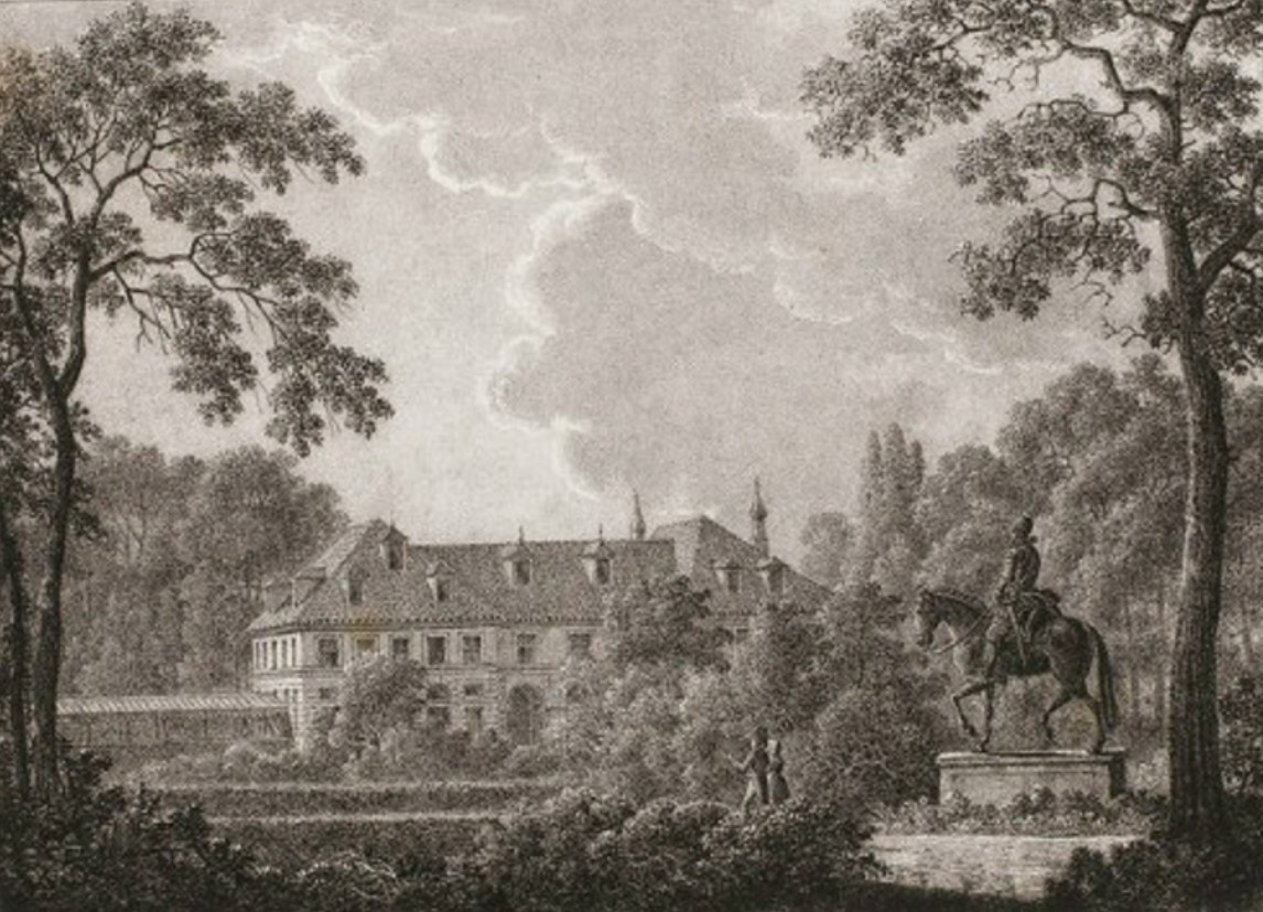 'La Casa del Campo près de Madrid', grabado publicado por primera vez entre 1819 y 1822